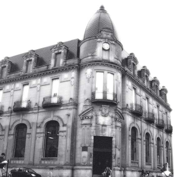 Edificio de la Casa Matriz del Banco de Azul fundado en 1928